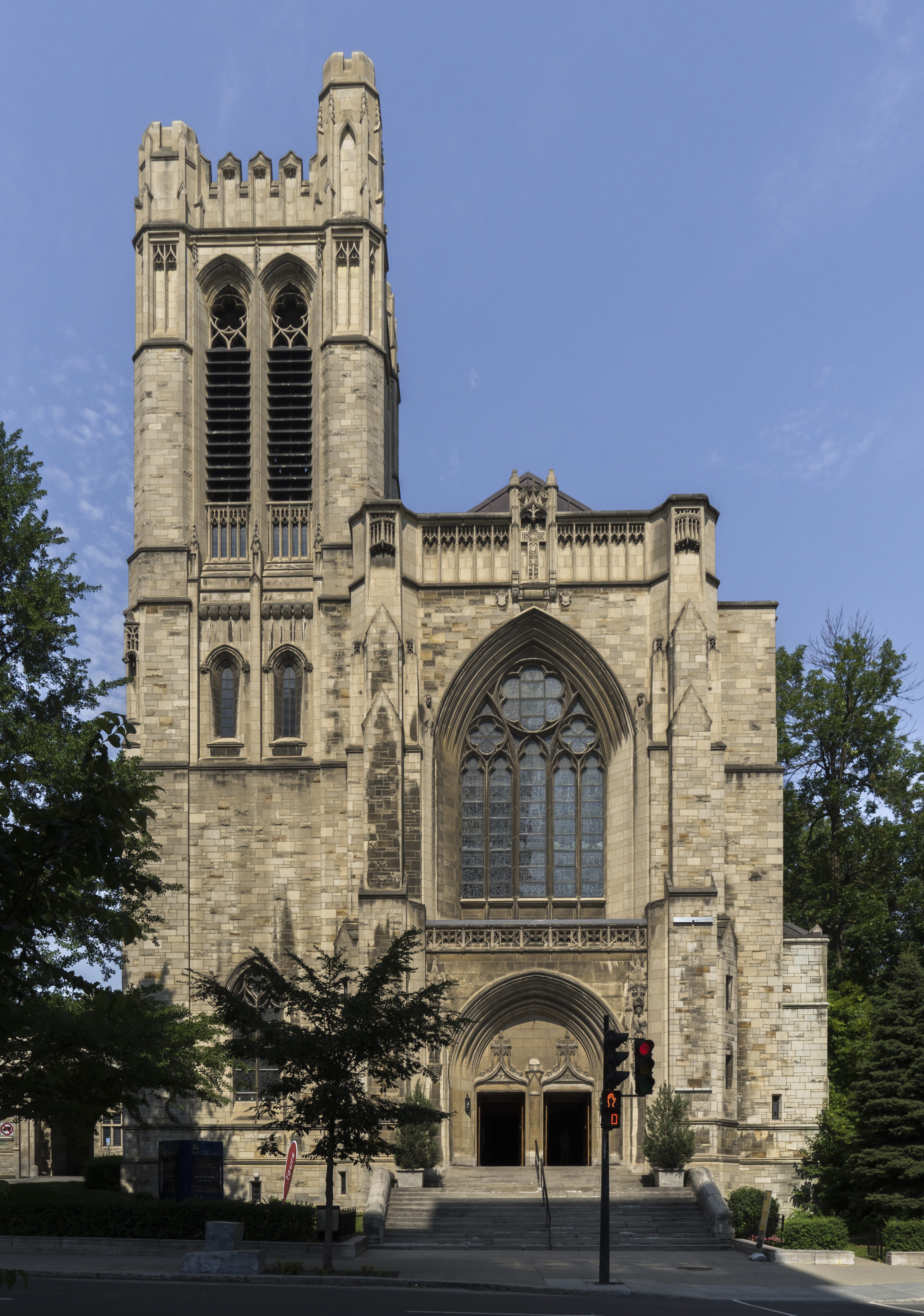 Church of St Andrew and St Paul, Montreal 1